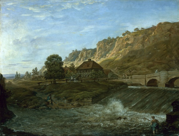 Abend - Forsthaus und Hegereiterbrücke im Plauenschen Grund in Dresden-Plauen